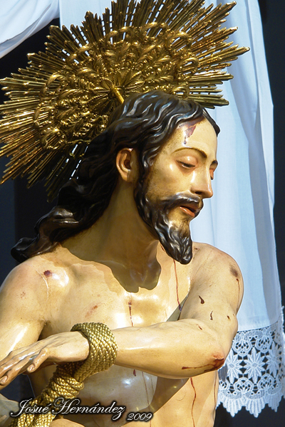 Stmo. Cristo atado a la Columna. 1689. Pedro Roldán. Parroquia de San Juan Bautista del Farrobo. Villa de La Orotava (Tenerife)